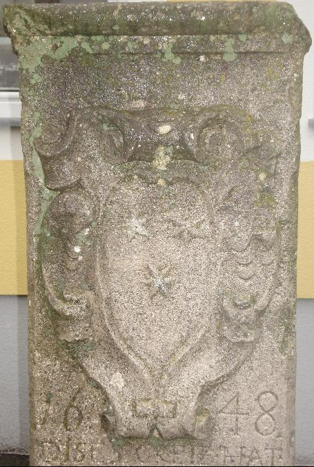 Pestkreuz mit dem Wappen der Familie Regondi